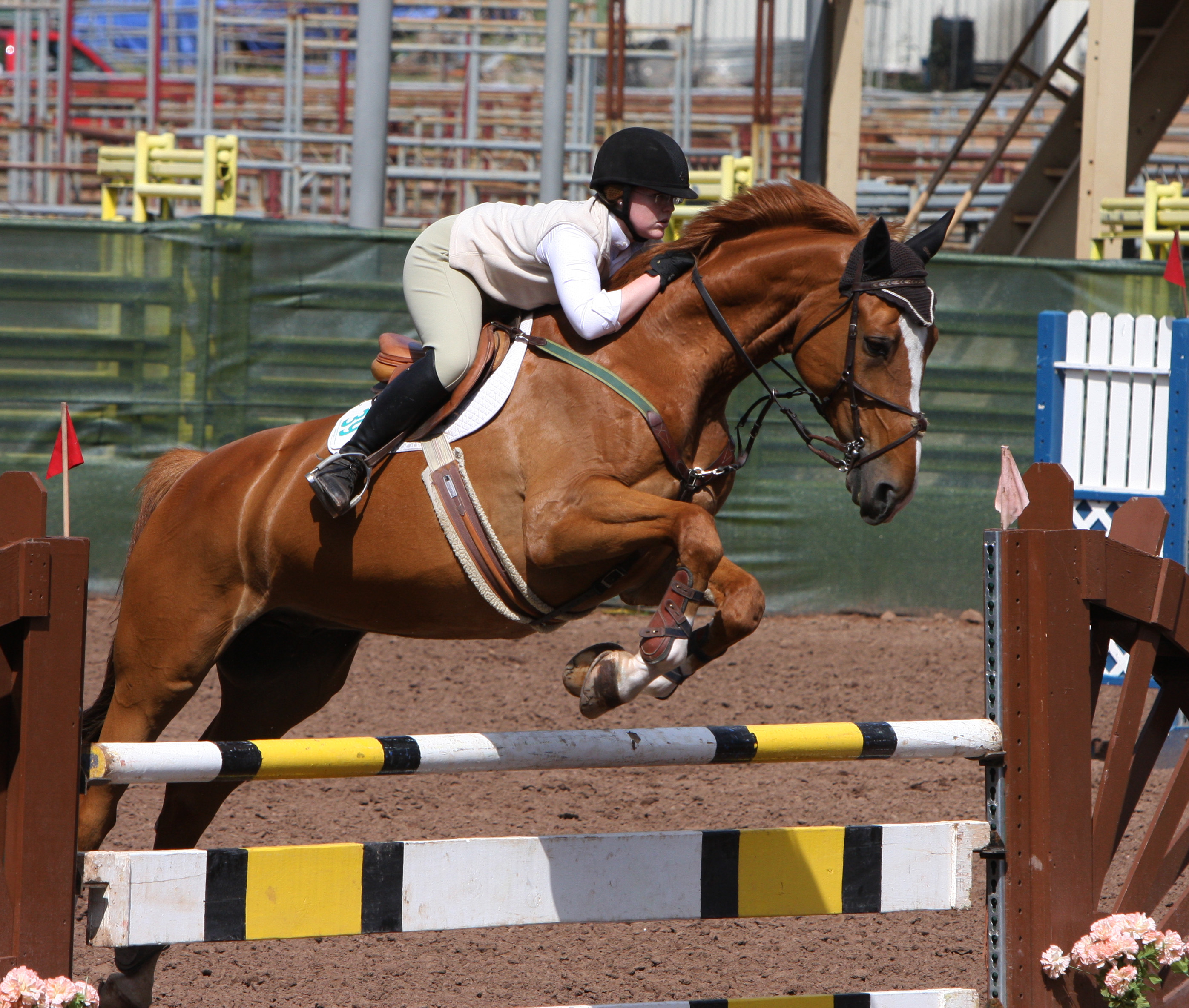 TATABRA KOJAK (Selle Francais) and Laureen McKenzie